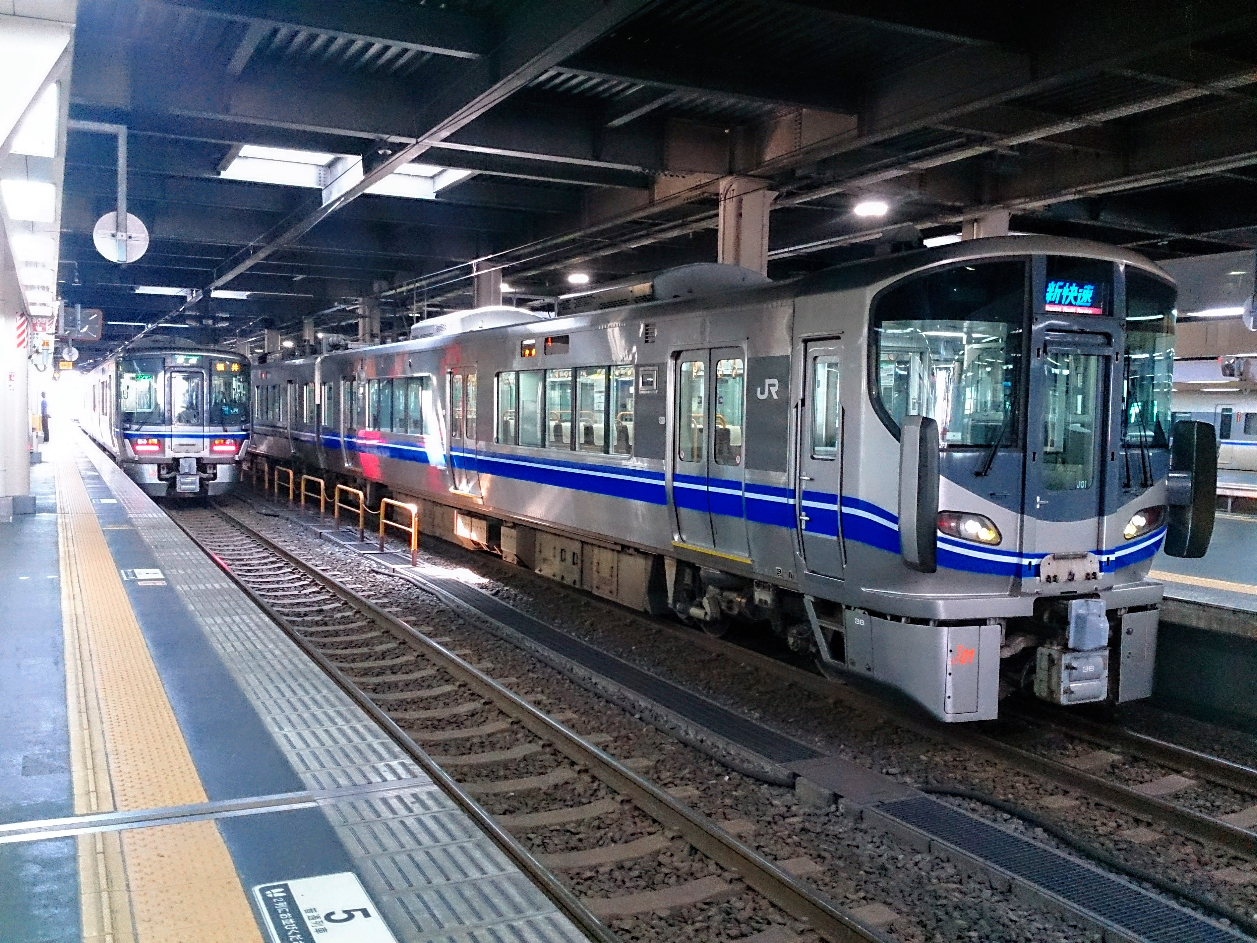 JR西日本の（左）521系1・2次車と521系3次車（左）、金沢駅にて撮影